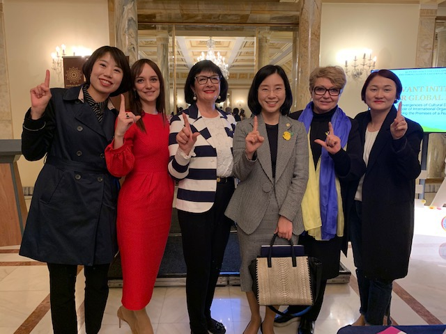 Зустріч